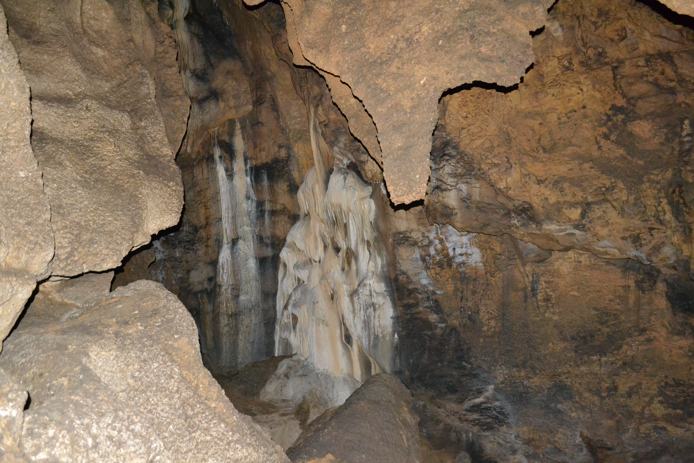 Једна од најмањих дворана пећине